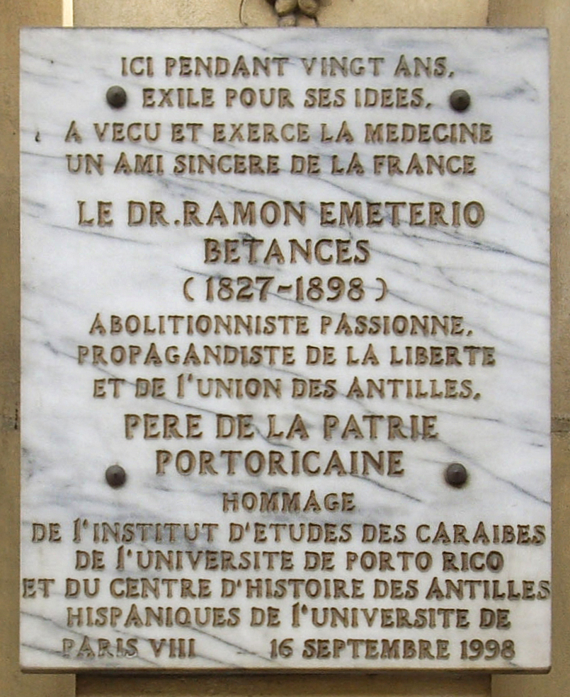 Plaque commémorative, 6 bis rue de Châteaudun, Paris 9e.« Ici pendant vingt ans, exilé pour ses idées, a vécu et exercé la médecine un ami sincère de la France, le Dr. Ramón Emeterio Betances (1827-1898), abolitionniste passionné, propagandiste de la liberté et de l'union des Antilles, père de la patrie portoricaine. Hommage de l'Institut d'études des Caraïbes de l'université de Porto Rico et du Centre d'histoire des Antilles hispaniques de l'université de Paris VIII. 16 septembre 1998. »